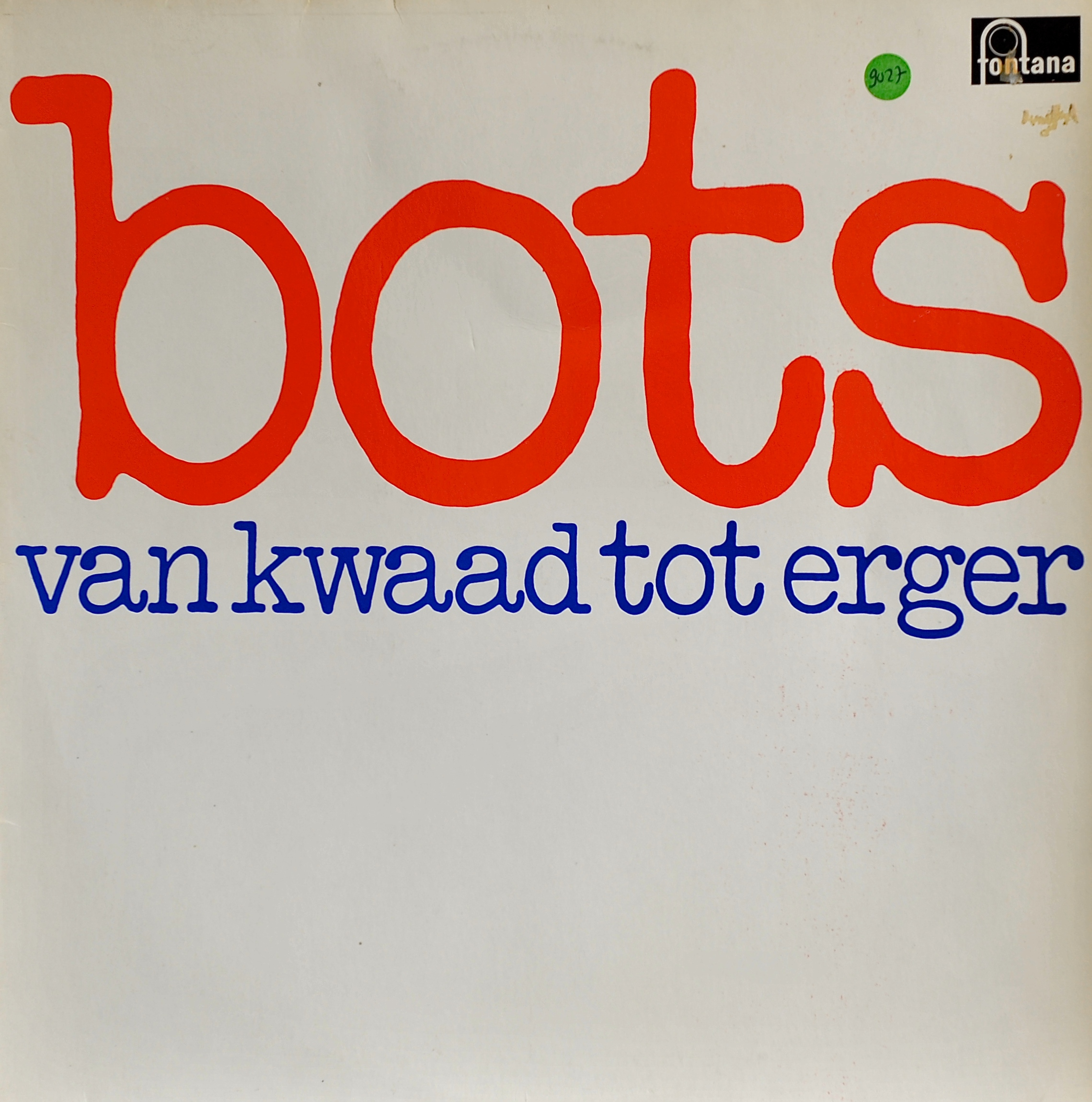 'Van kwaad tot erger' (1975) van de Nederlandse groep Bots. De groep werd opgericht in 1974 door Hans Sanders die toen aan de Sociale Academie in Eindhoven studeerde, hetgeen aan de liedjes was te merken. Maatschappijkritische liedjes voerden de boventoon. Ooit had ik zo'n 500 elpees, maar in een opruimingsvlaag -en omdat ik inmiddels zwaar had ingezet op cd- heb ik ze op 20 stuks allemaal weggedaan. Vooral vanwege de goede liedteksten heb ik deze elpee bewaard.